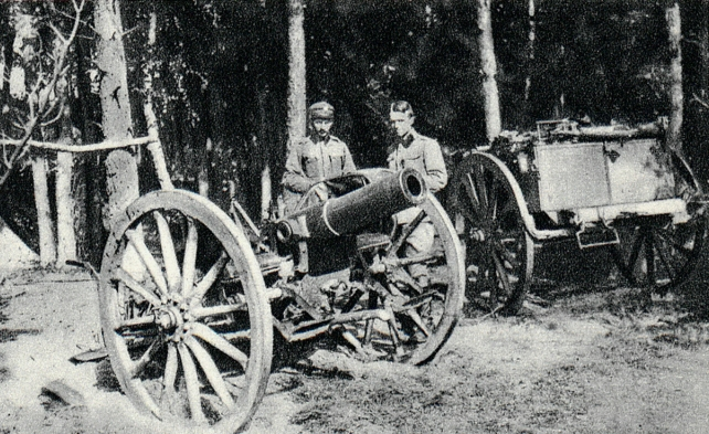 Haubice 10 cm M. 99 Feldhaubitze Legionów Polskich na pozycji.